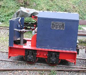 DIEMA Feldbahnlok DL 6, Spurweite 600 mm